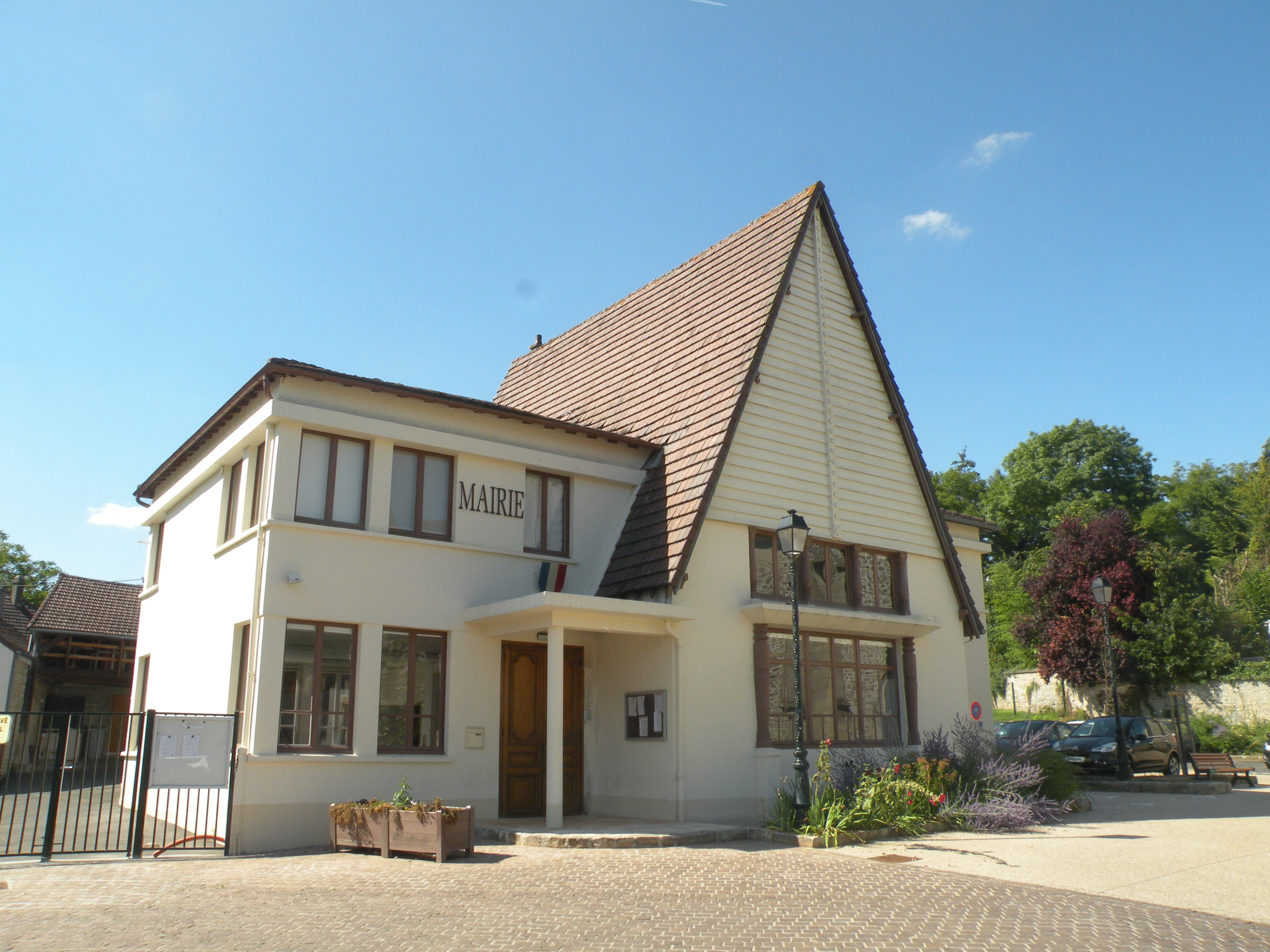 mairie de Seraincourt (Val-d'Oise)